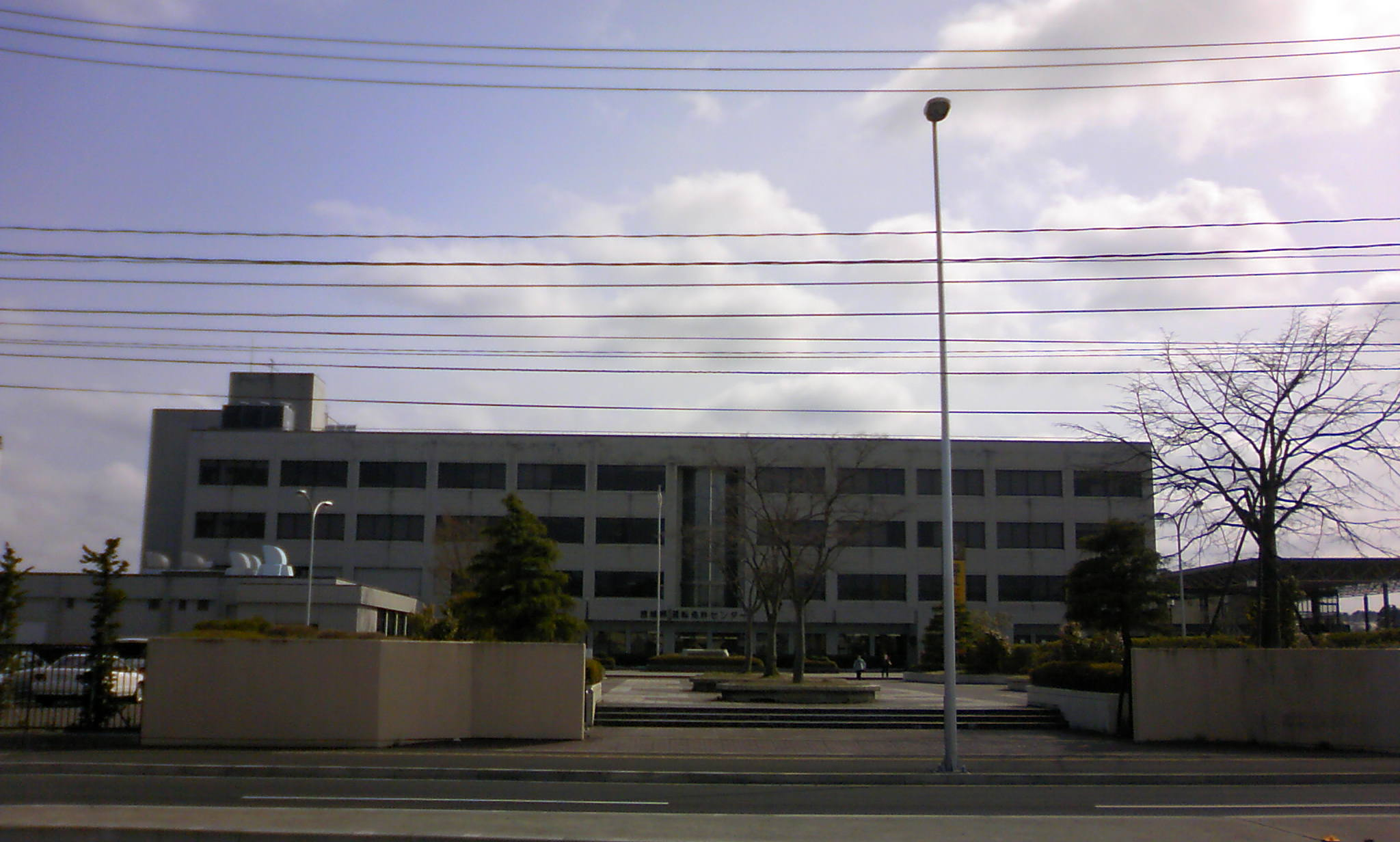 宮城県運転免許センター